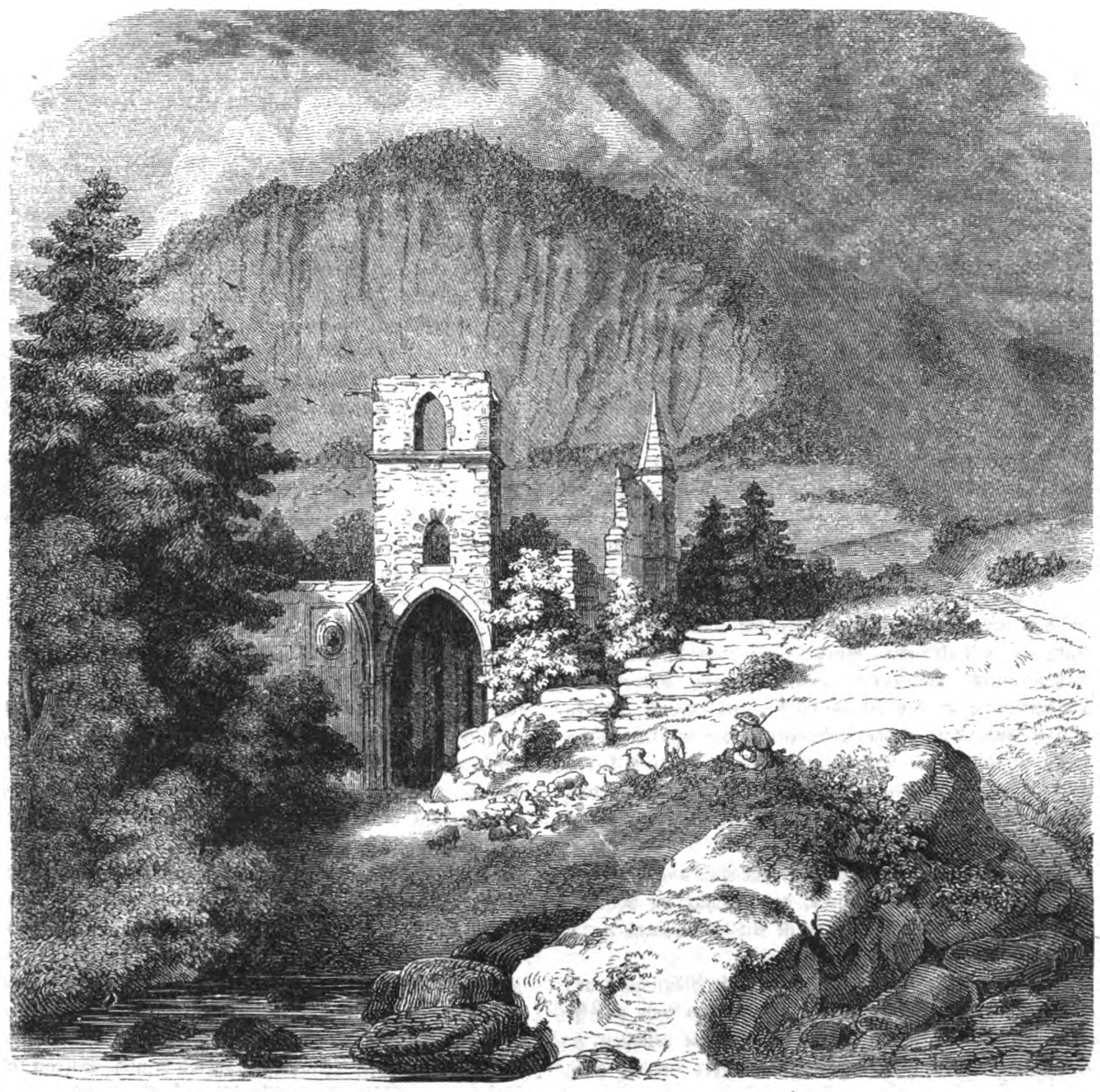 Ansicht der Ruinen des Klosters Allerheiligen in Baden.